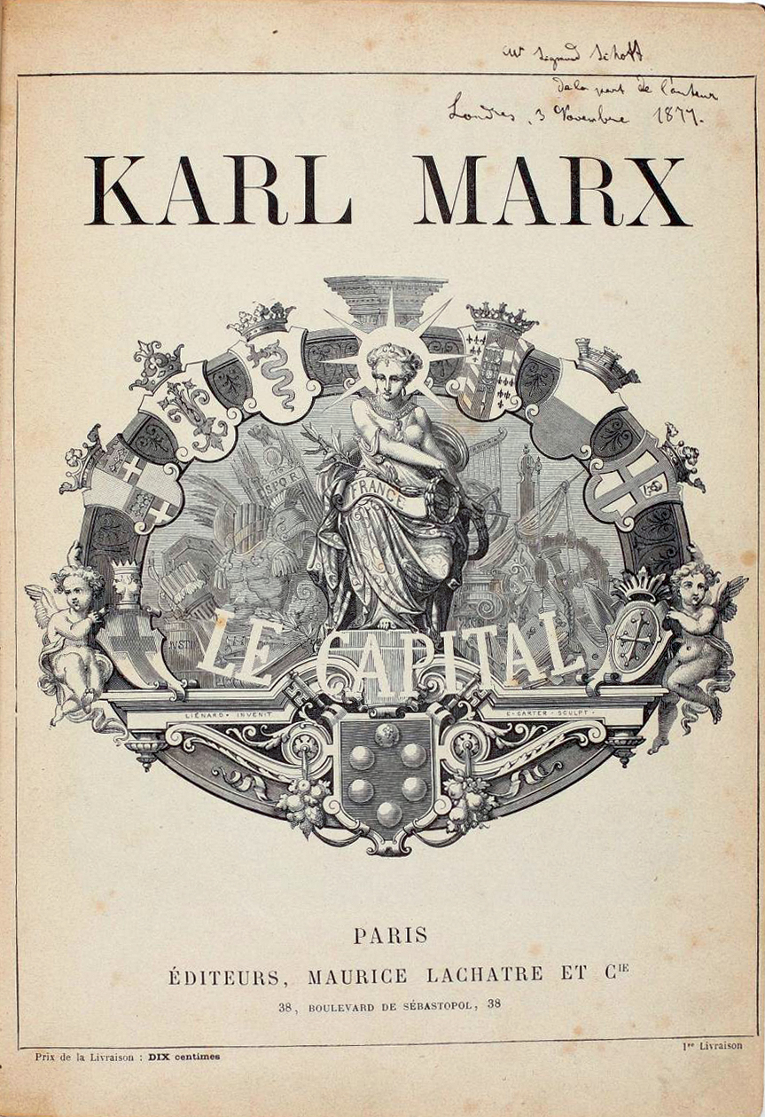 Photographie de la page de titre.